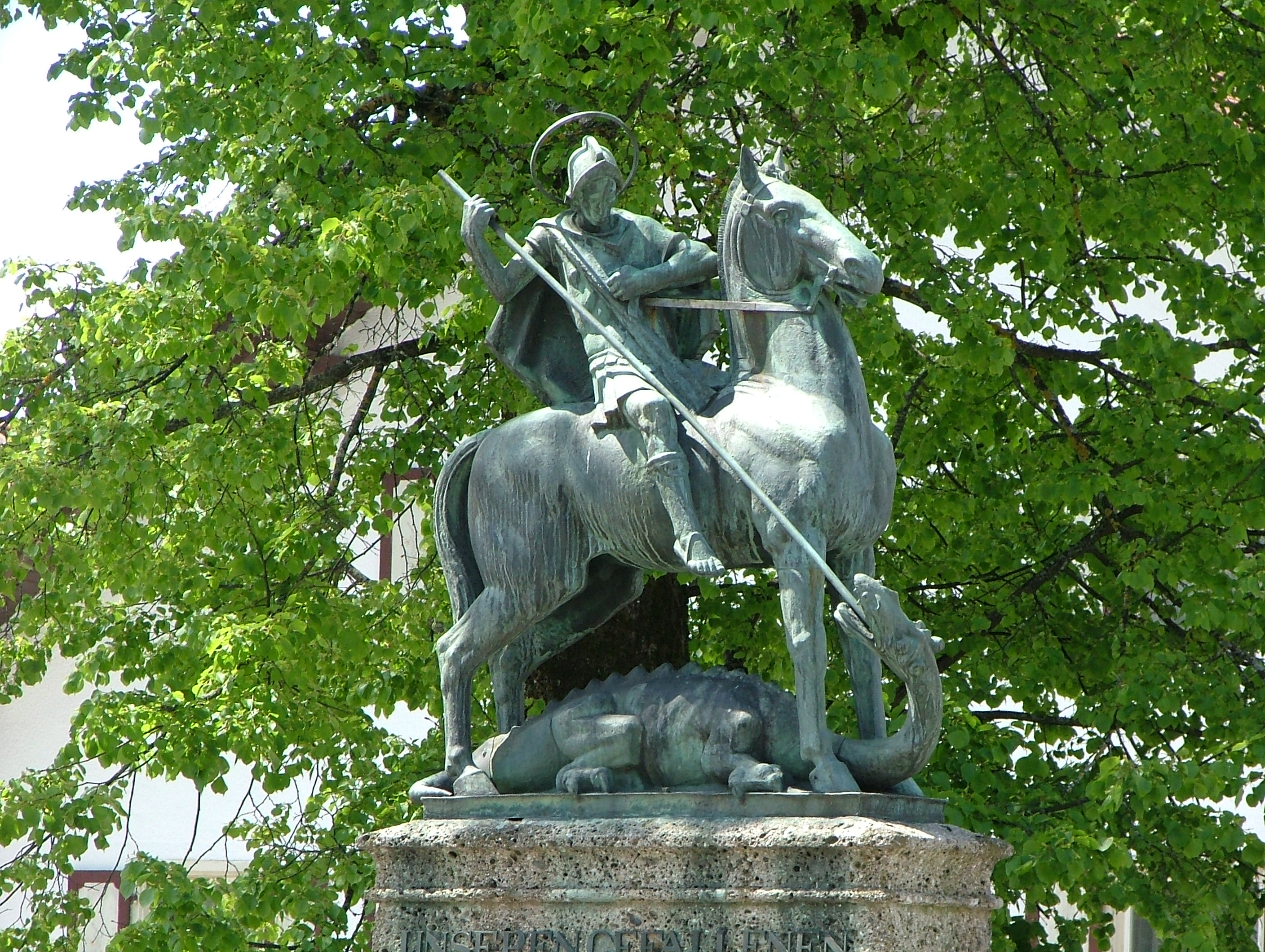 Sulzberg, Germany